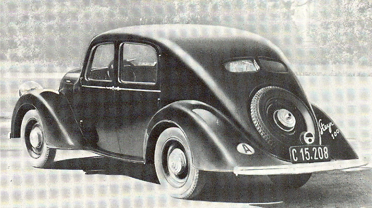 Steyr 100 Saloon 4 doors (1935)